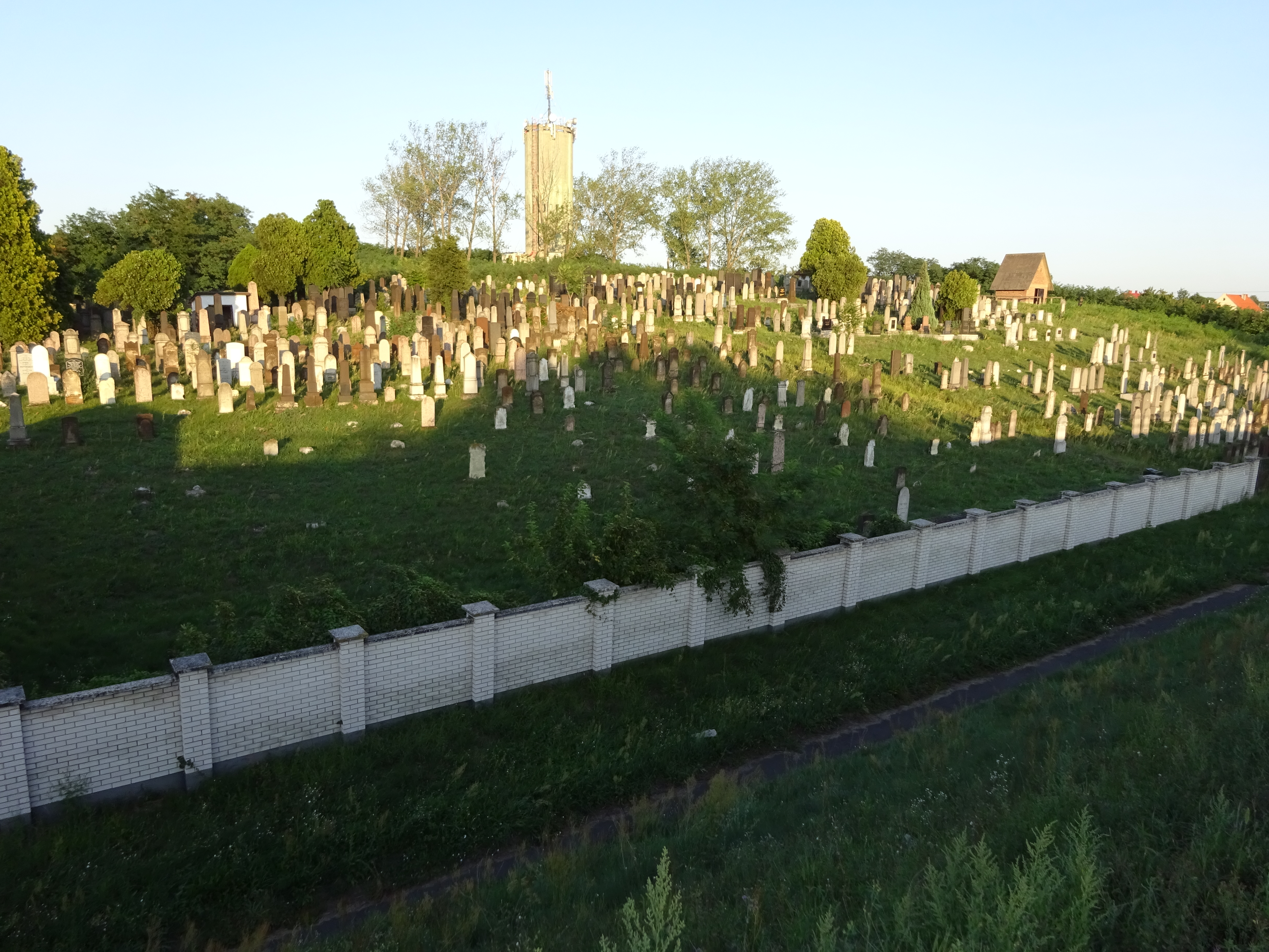 Árpád utcai temető Kisvárdán, zsidó temető!